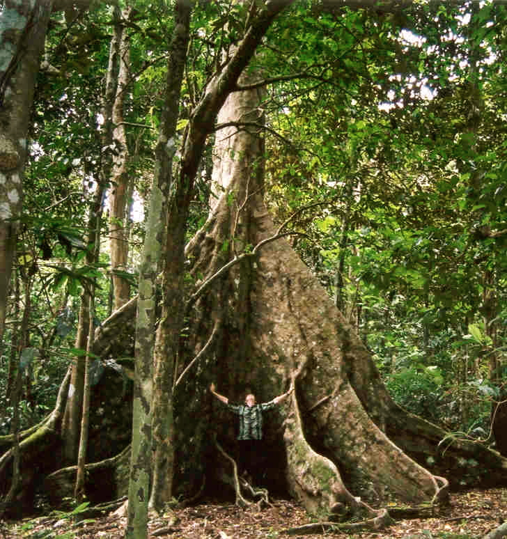 Dracontomelon vitiense — Nakatambol. Vatthe Conservation Park, Espiritu Santo, Vanuatu. Un arbre de fruits tropicaux sous-utilisés.